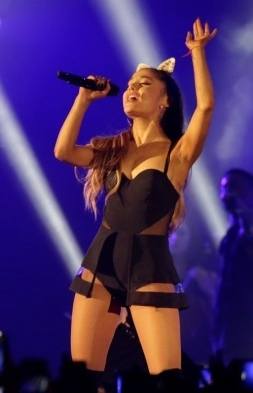 Imagen de la cantante Ariana Grande durante la gira The Honeymoon Tour en su paso por Jakarta (2015).